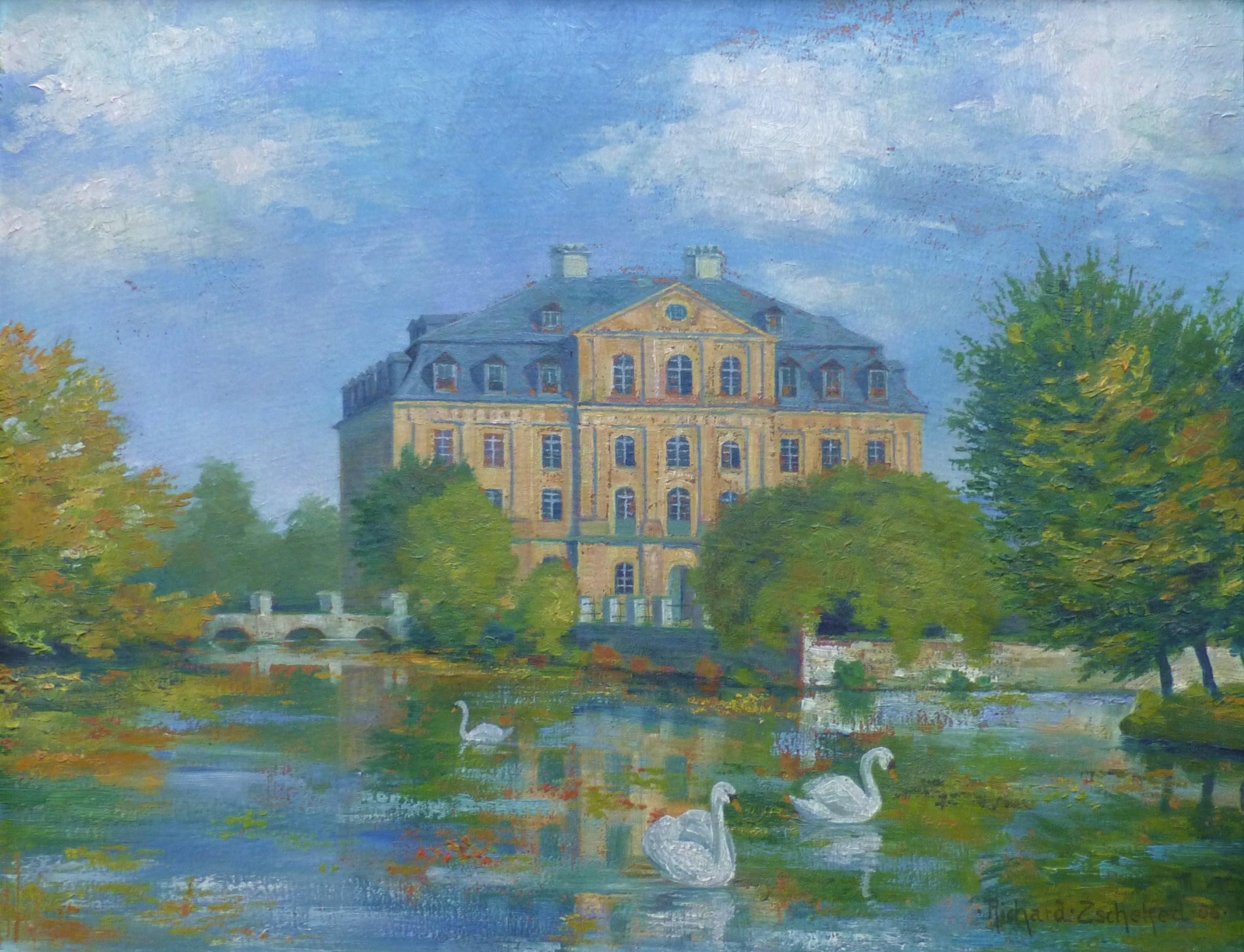 Tinzer Wasserschloss